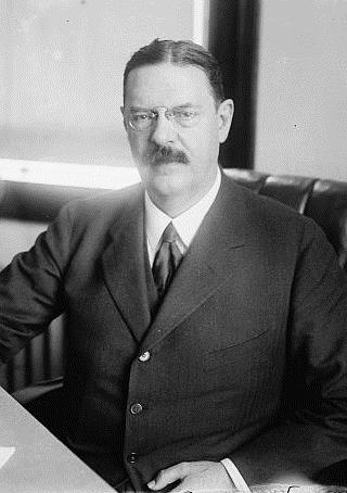 Lewis Nixon